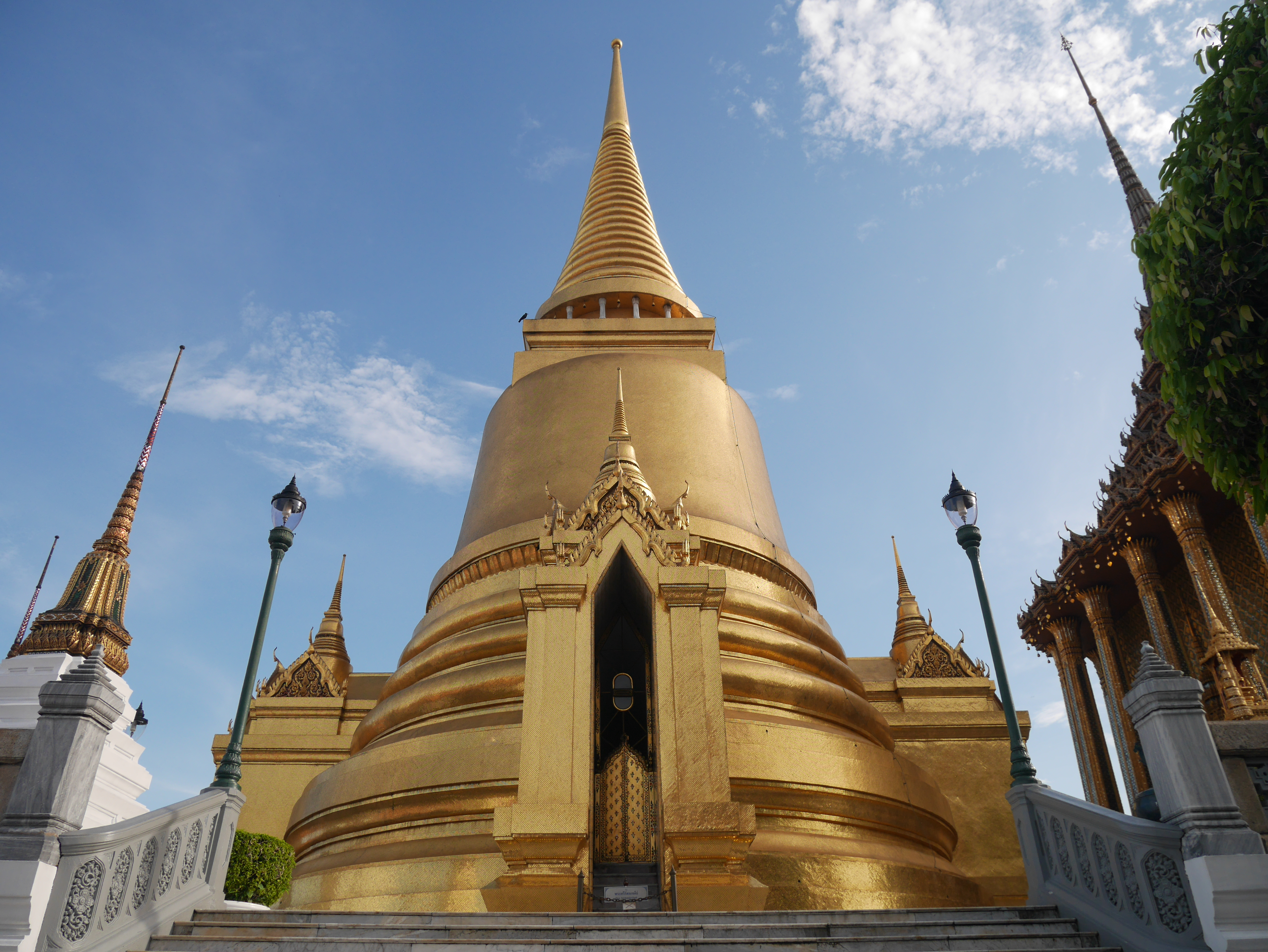 พระบรมมหาราชวังและวัดพระศรีรัตนศาสดาราม เจ้าของบัญชี กสิณธร ราชโอรส เป็นเจ้าของบัญชีเดียวกับ บัญชี Phonlakrit Sunthornphon ของ Facebook บัญชี Tsutomu RIkimi ของ Google และ Panoramio .com บัญชี ซูบารุโยของ กสิณธร ราชโอรส same account holder of Facebook (Phonlakrit Sunthornphon),Google and (Tsutomu RIkimi) and ซูบารุโย at